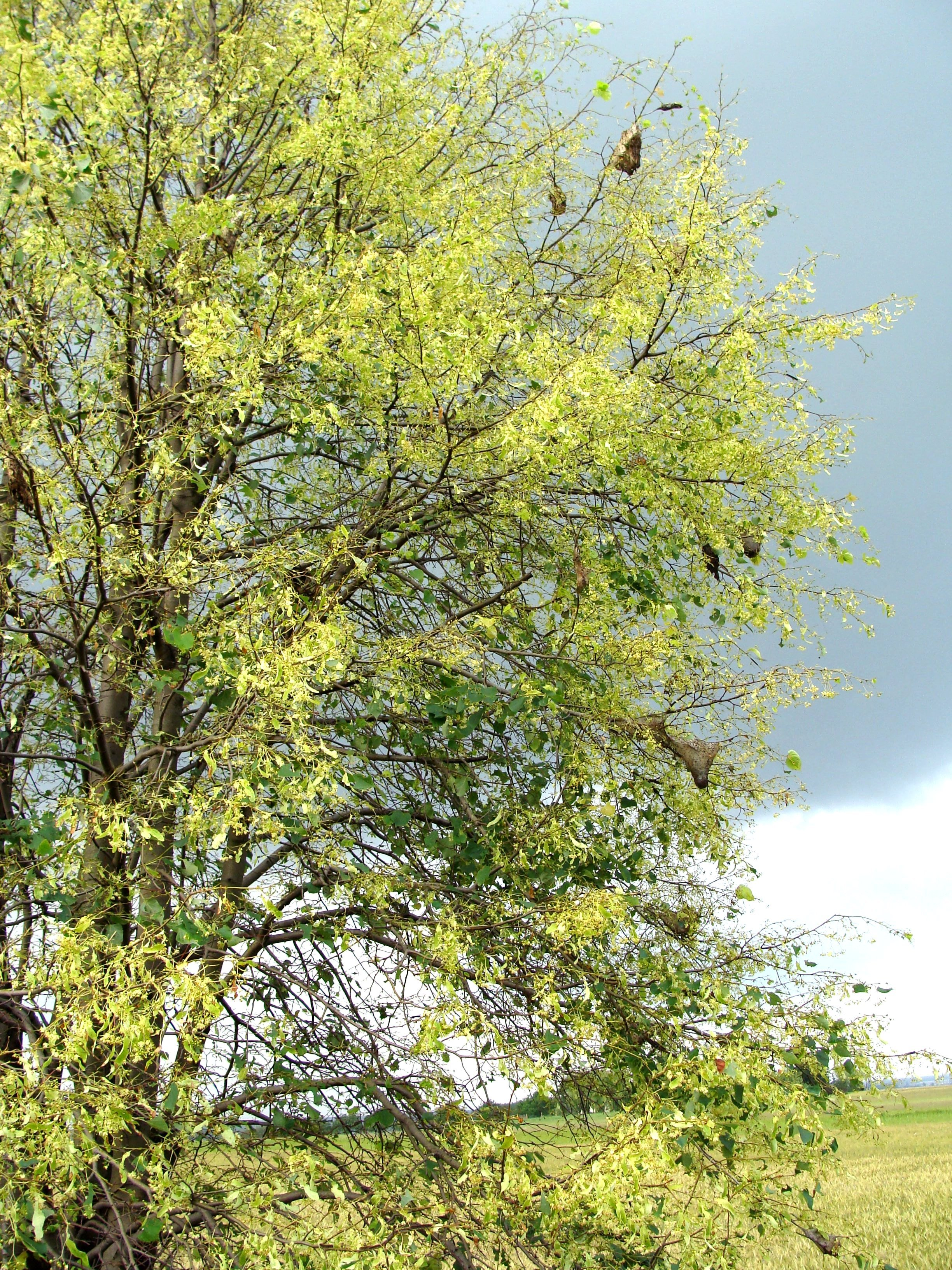 Drzewo lipy całkowicie ogołocone z liści - zielone to niejadalne przylistki kwiatowe. Przykład gołożeru.